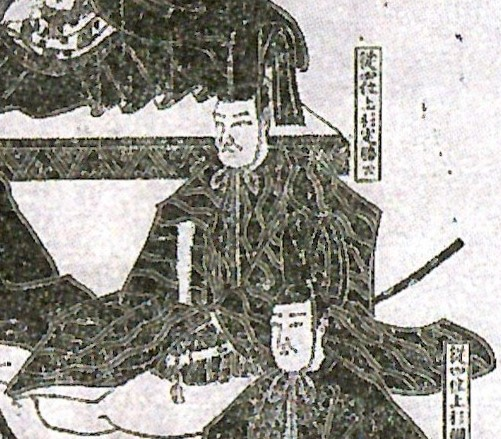 上杉定勝の肖像。